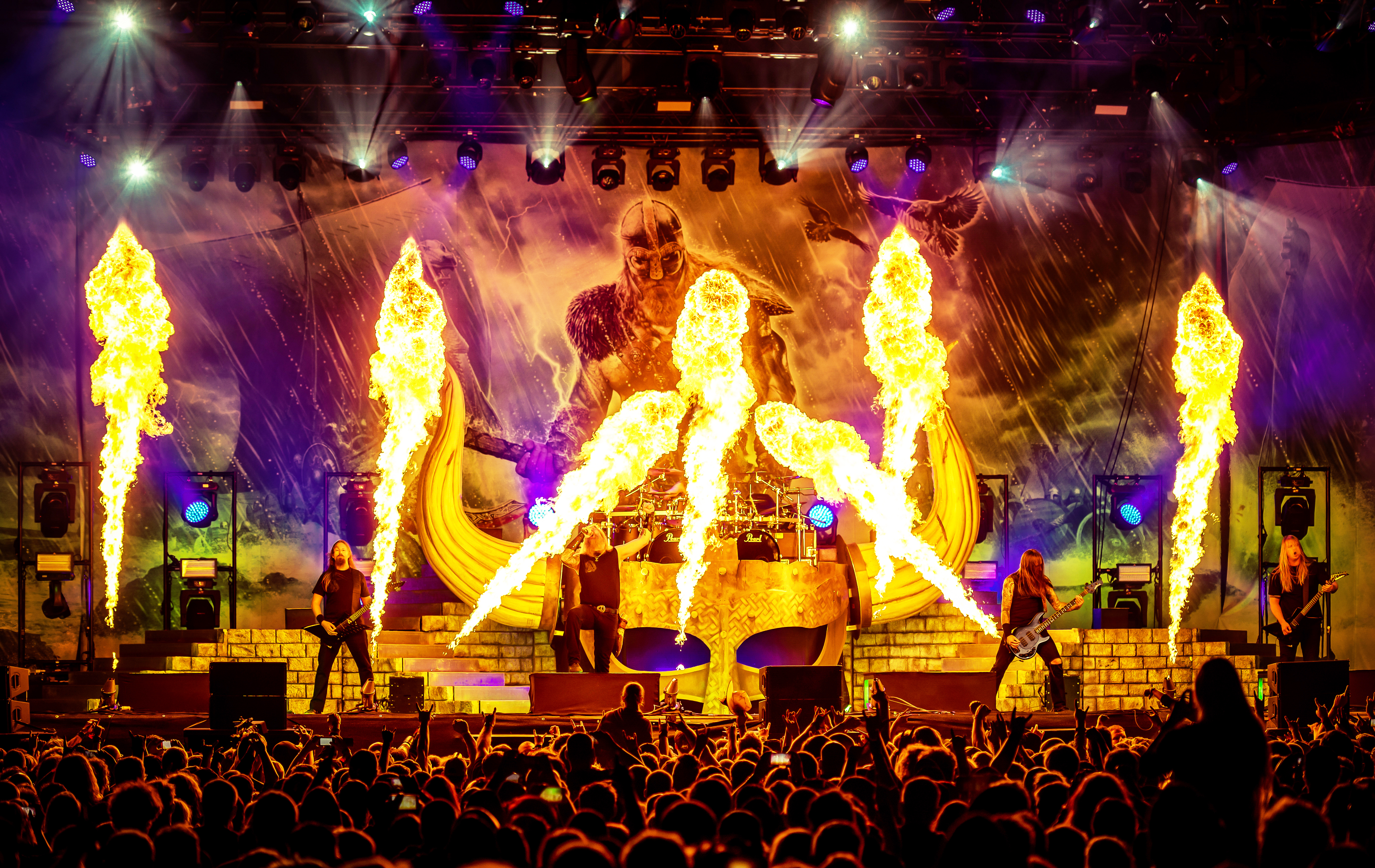 Amon Amarth beim Reload Festival 2017